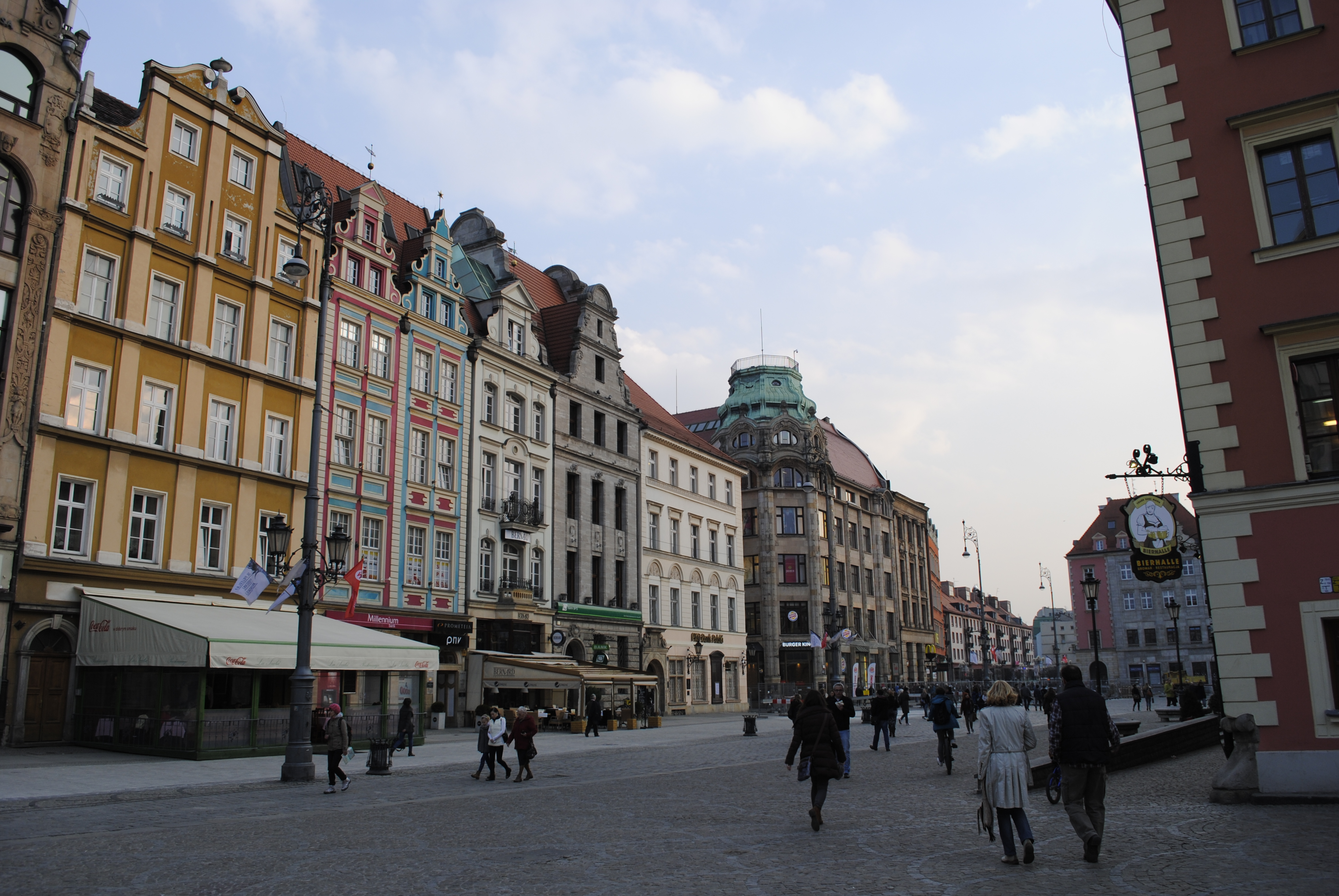 Ostseite des Rings in Breslau